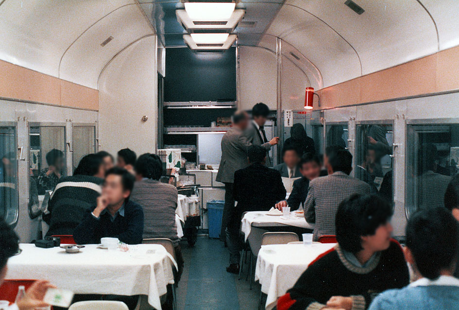 サシ581-19 車内